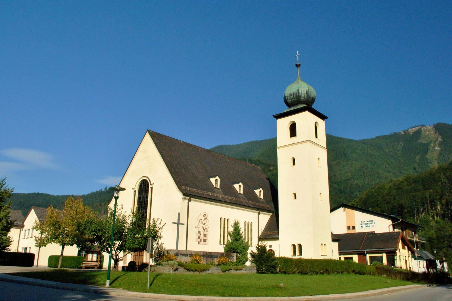 Kath. Pfarrkirche Hl. Josef, 4464 Kleinreifling